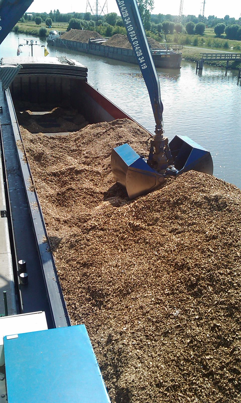 Transport de chips de bois par bateau